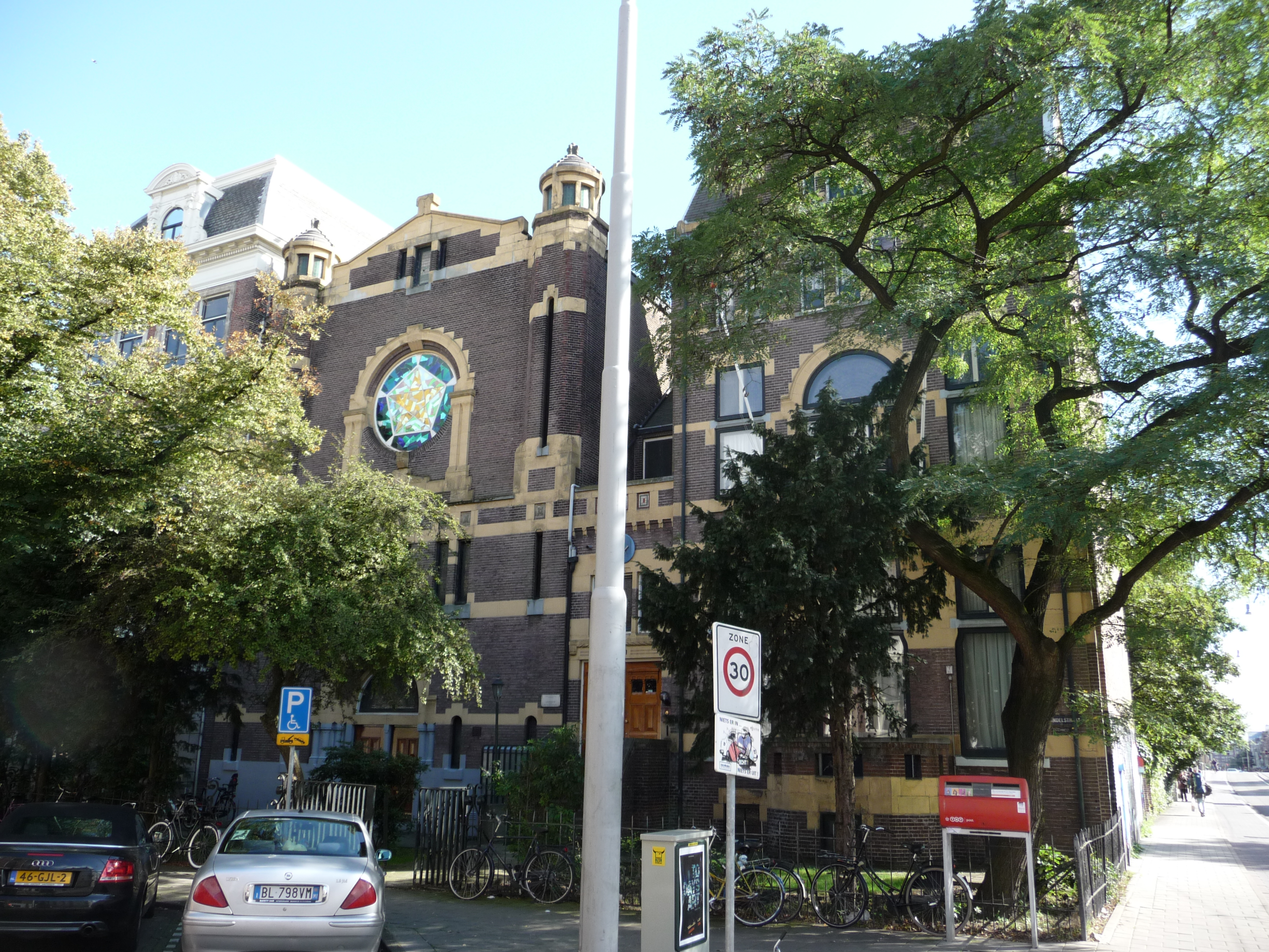 Rijksmonument Vondelstraat 39, Amsterdam